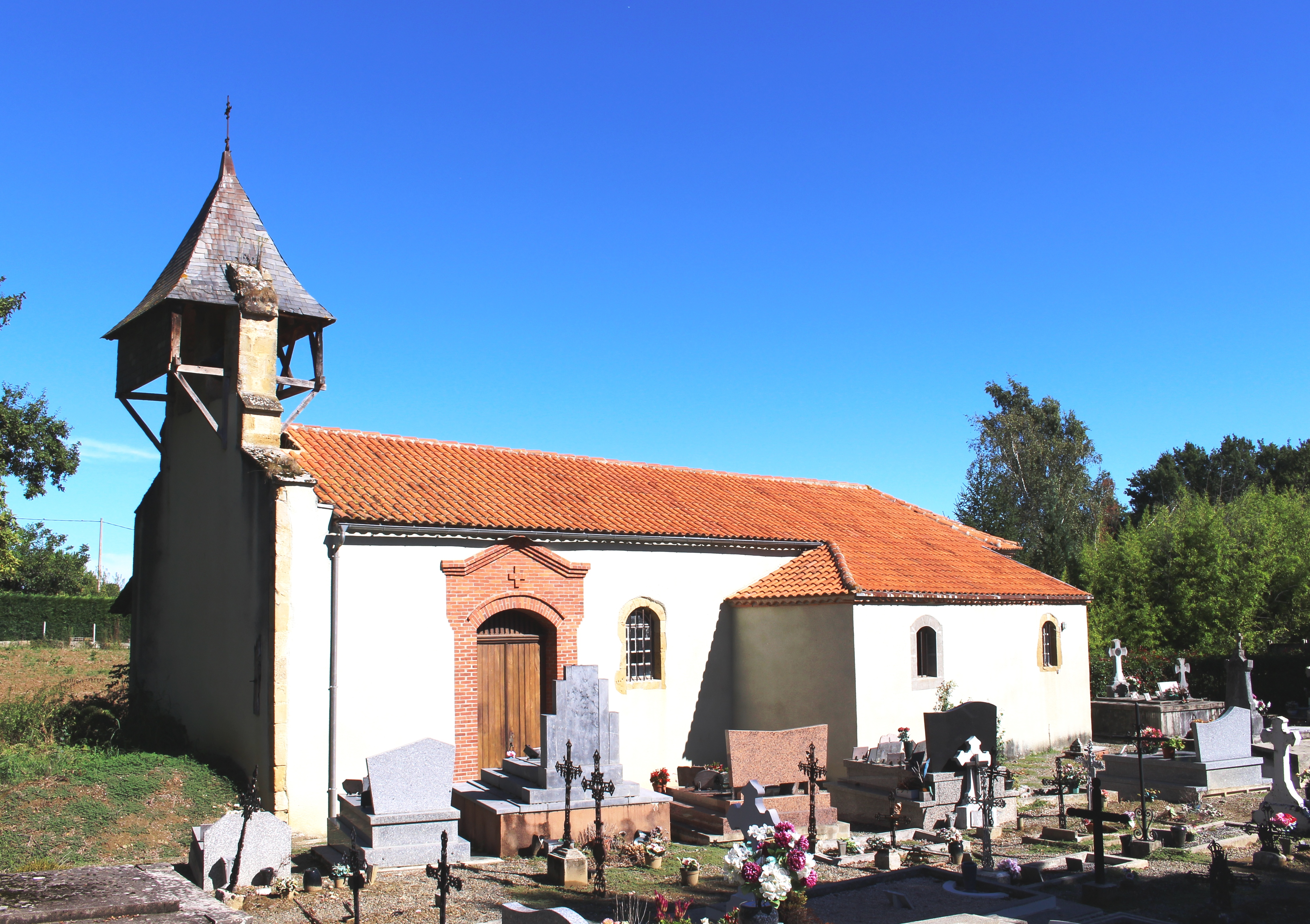 Église Saint-Caprais de Buzon (Hautes-Pyrénées)